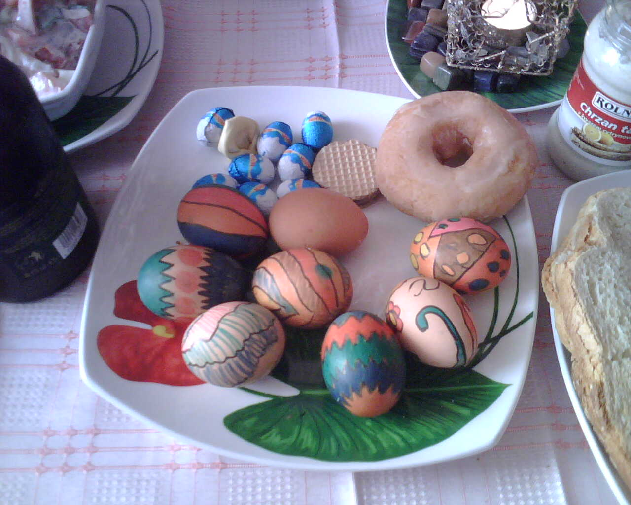 Przykład jak można zrobic swoje własne pisanki na Wielkanoc